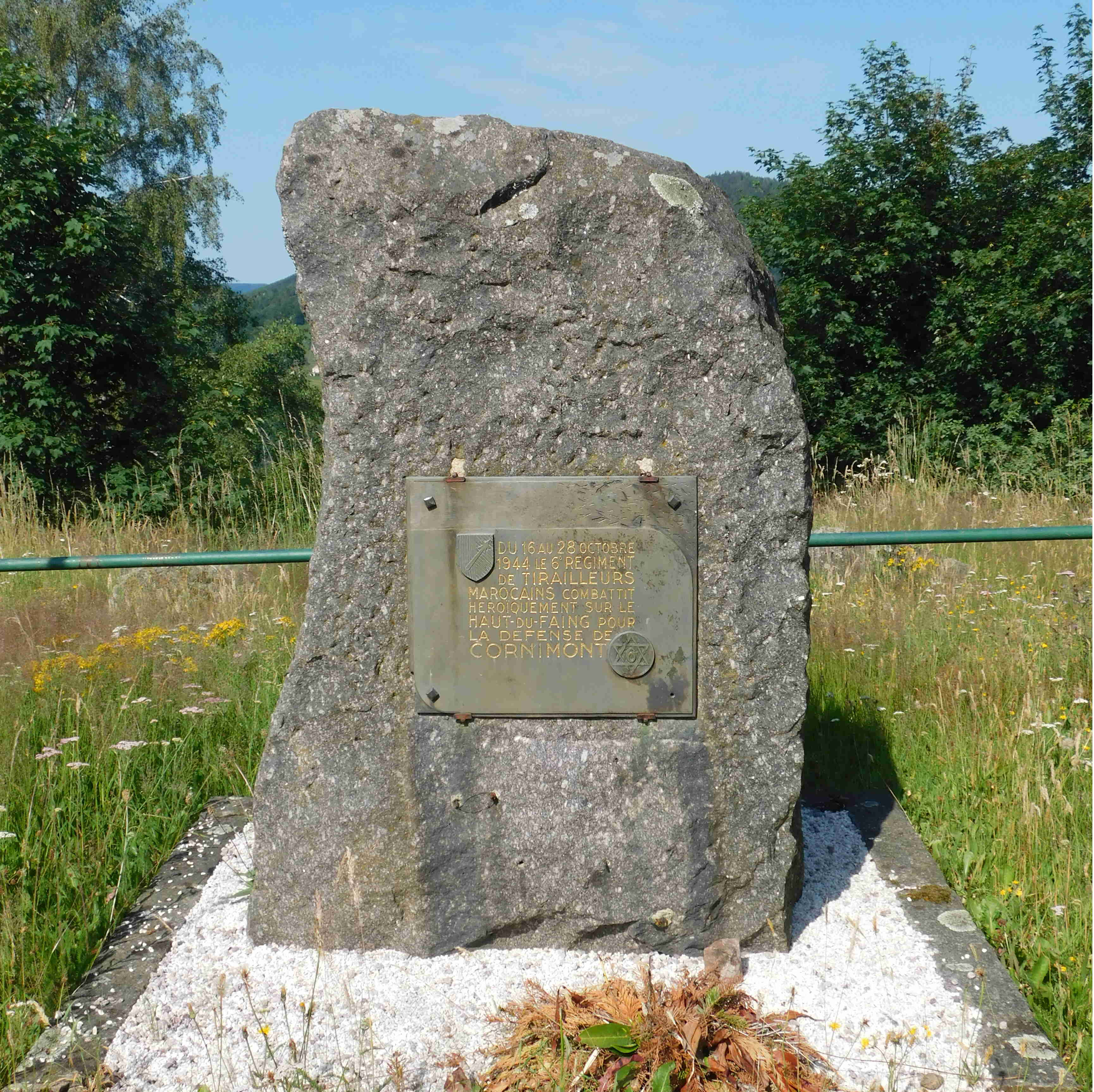 Monument du 6e régiment de tirailleurs marocains à Cornimont (88)